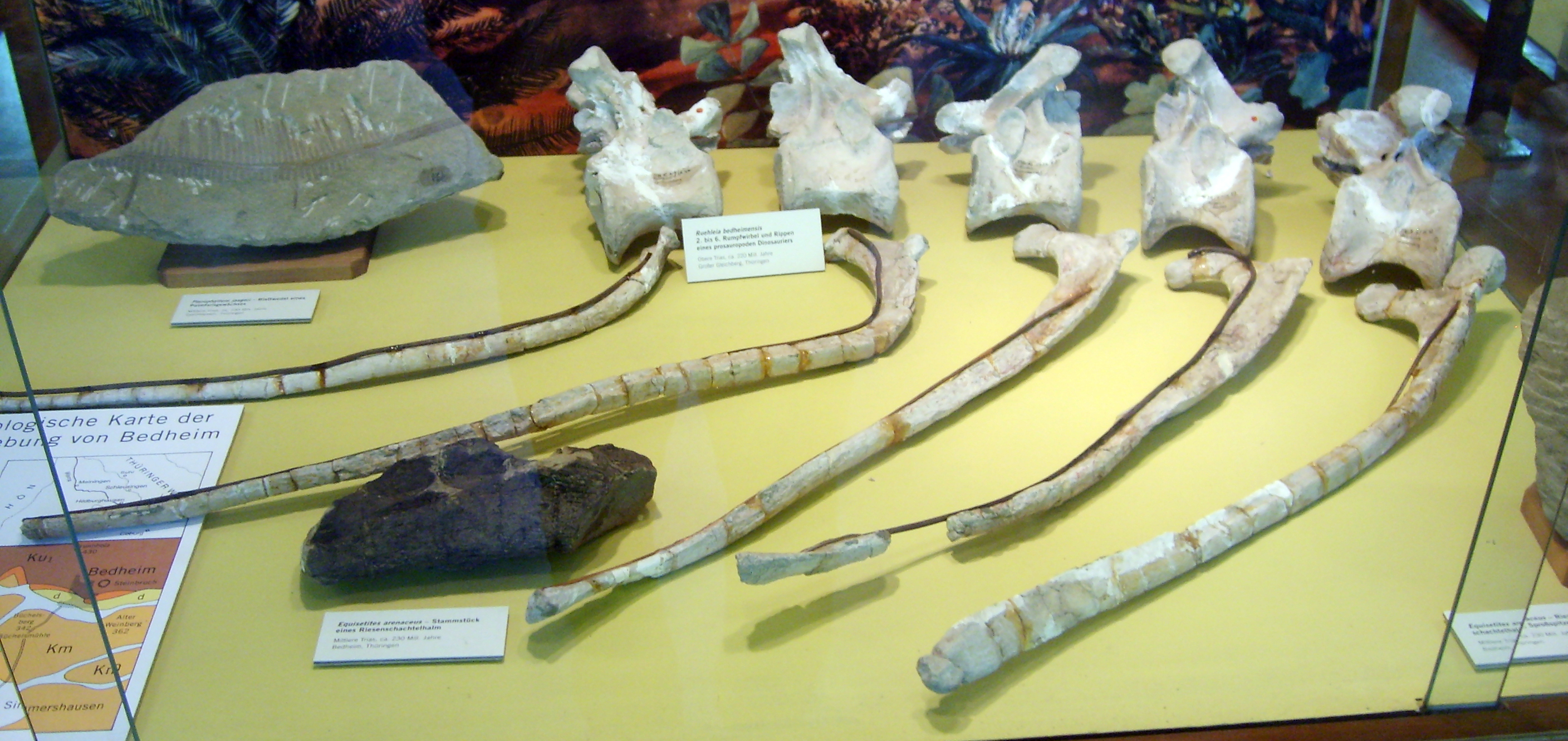 Ruehleia bedheimensis vertebrae and ribs, Naturkunde Museum, Berlin.